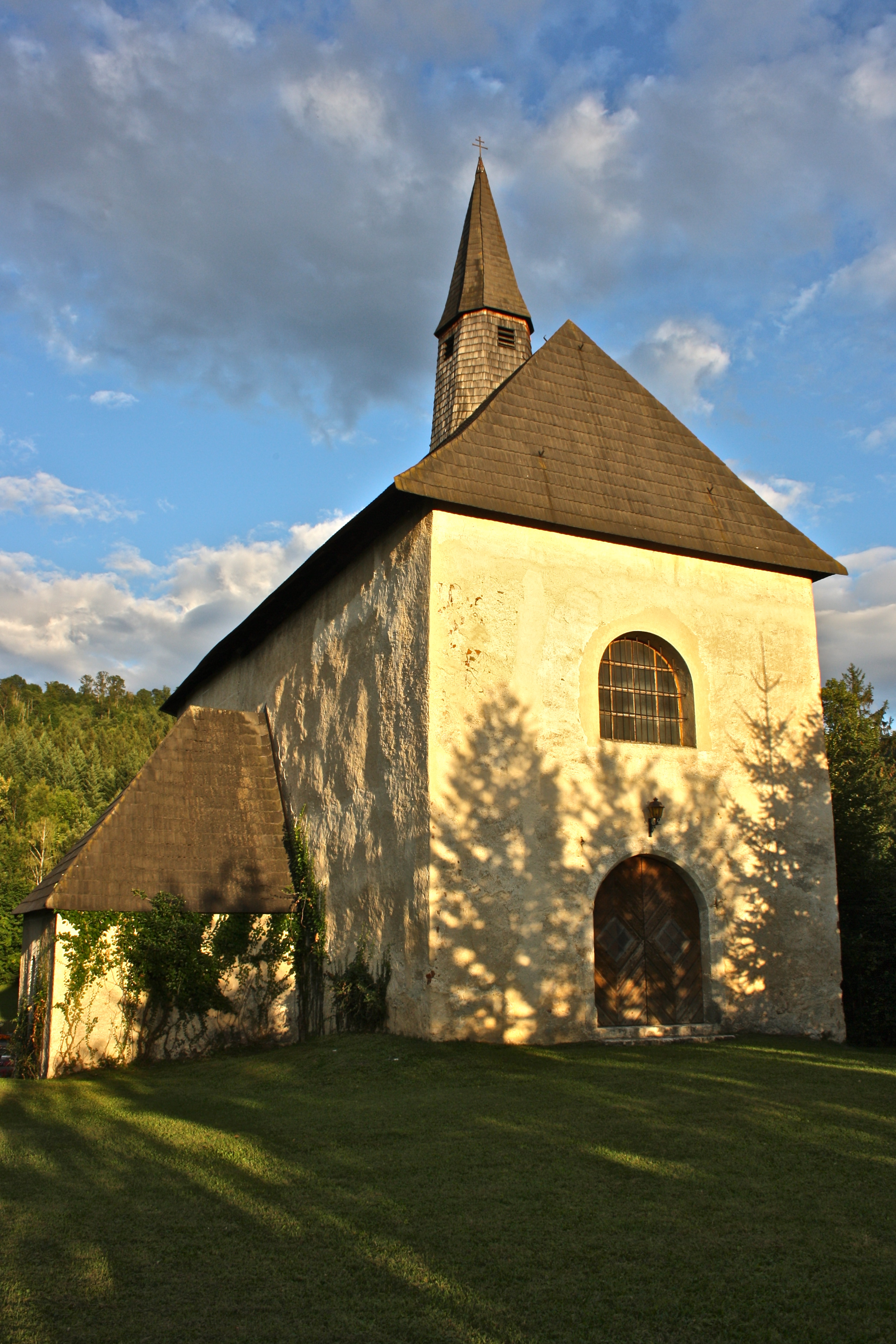 Westseite der Philippskirche in Kranichberg mit Schattenspiel umstehender Bäume.